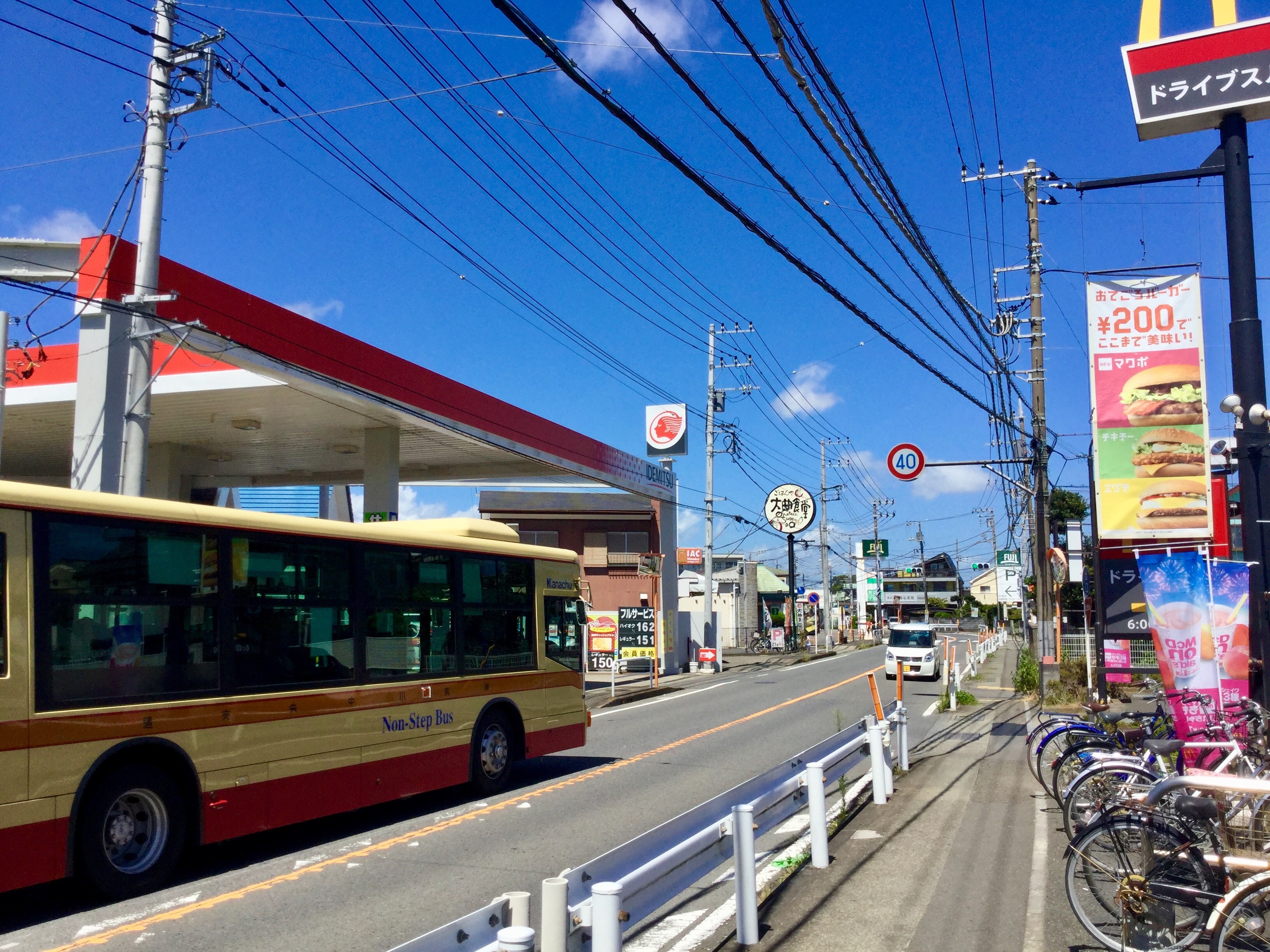 神奈川県高座郡寒川町にある「香川駅入口」バス停